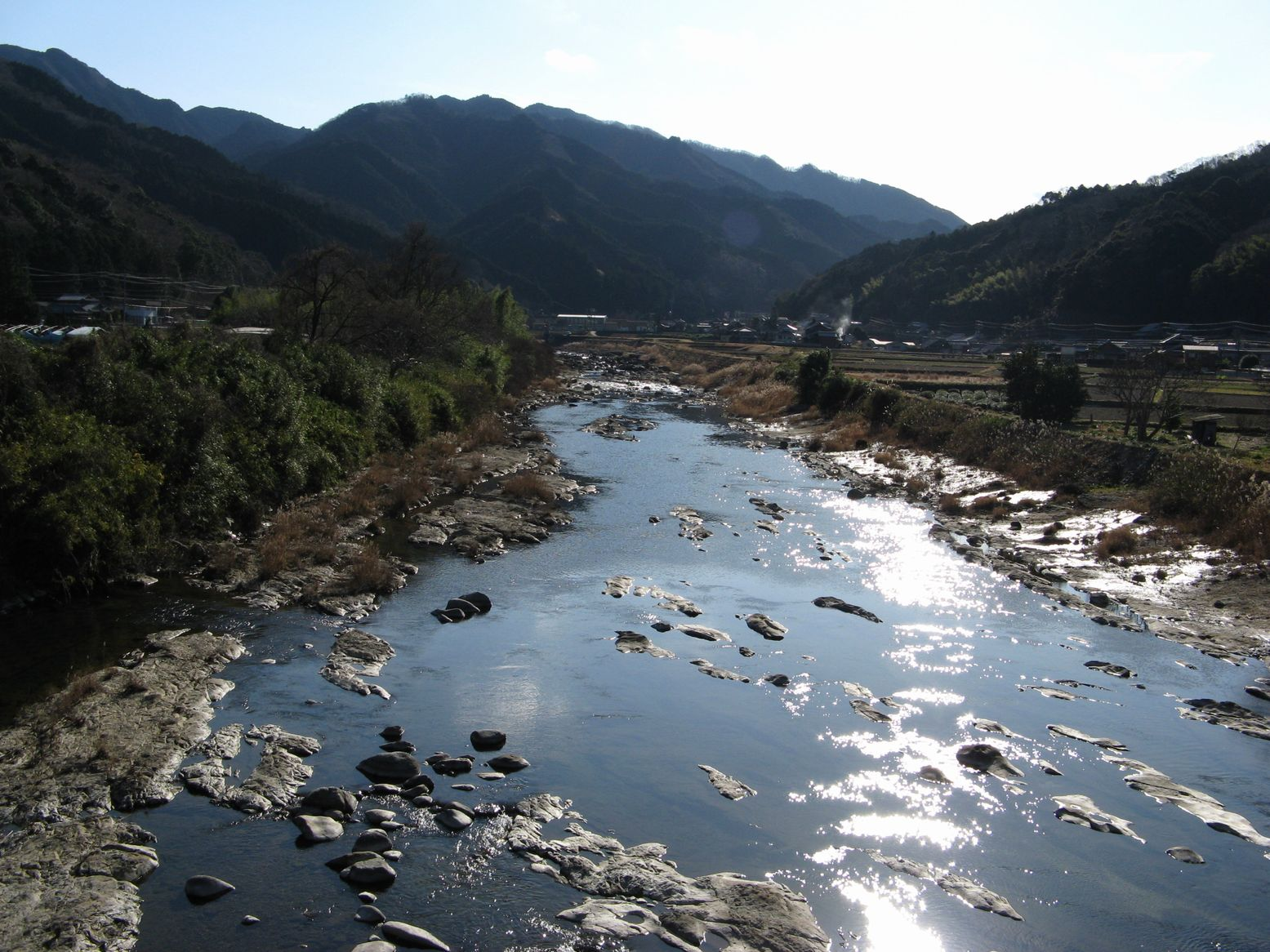 雲出川 八代橋（名松線伊勢竹原駅付近）から上流方を望む 2008年1月 Bakkai撮影